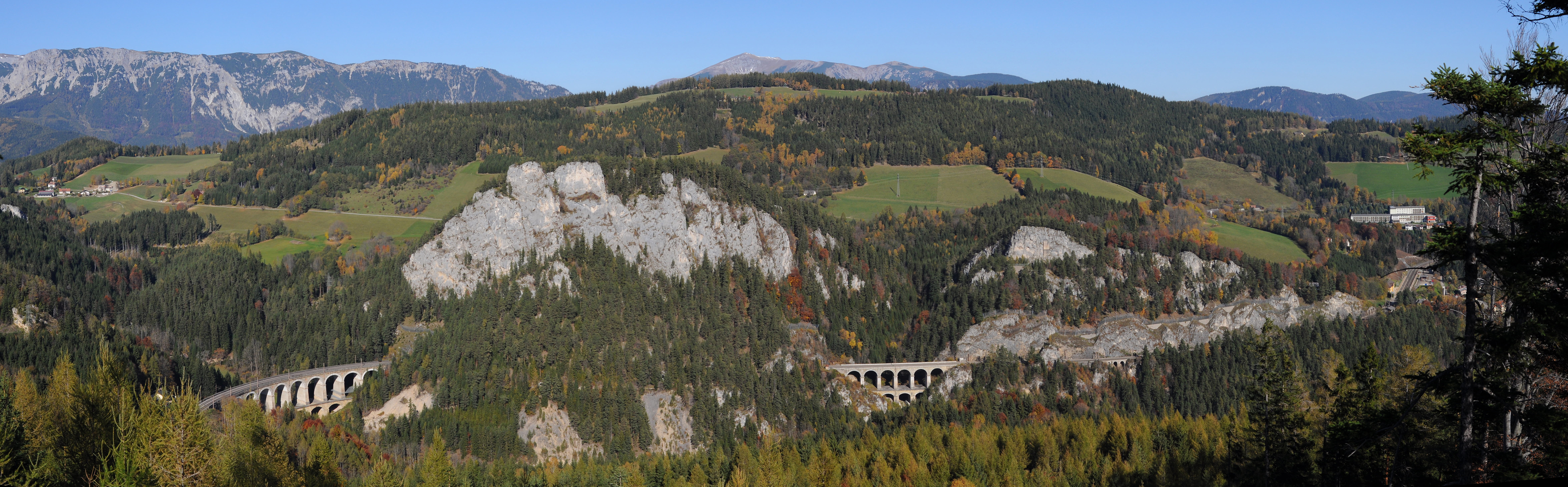 Panoramablick auf die Semmeringbahn zwischen dem Kalte-Rinne-Viadukt und dem Bahnhof Breitenstein. Im Hintergrund ist die Rax-Schneeberg-Gruppe erkennbar.